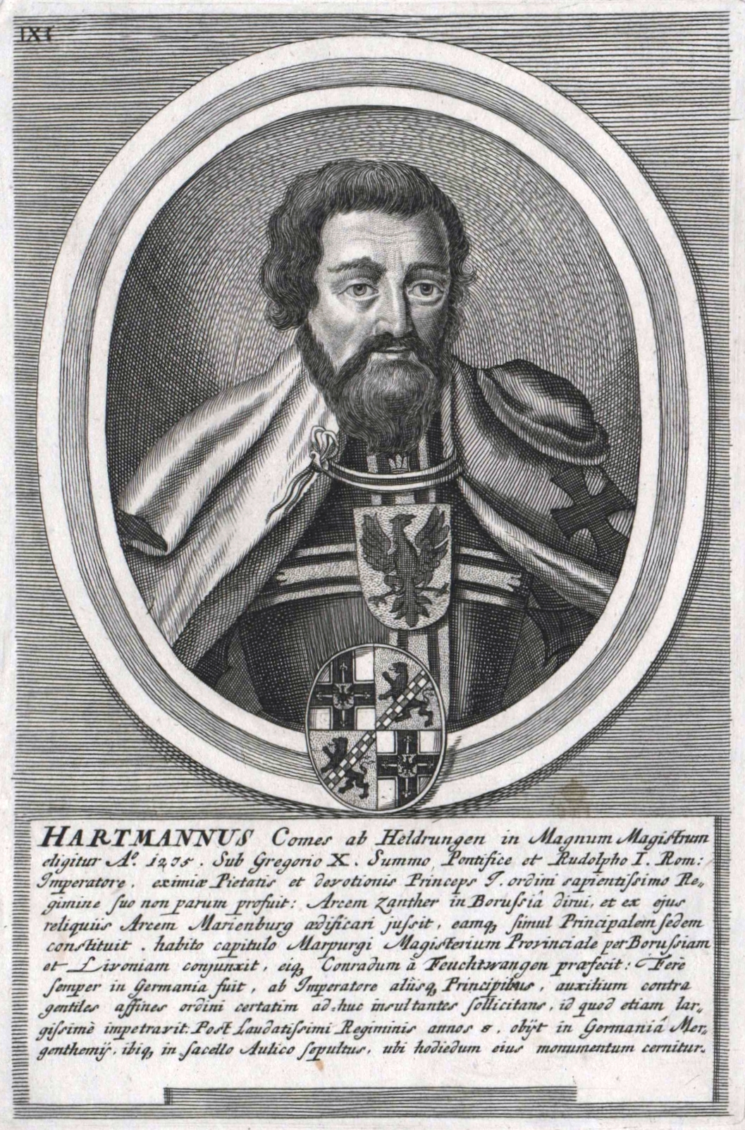 Hartmann von Heldrungen (1210-1283)